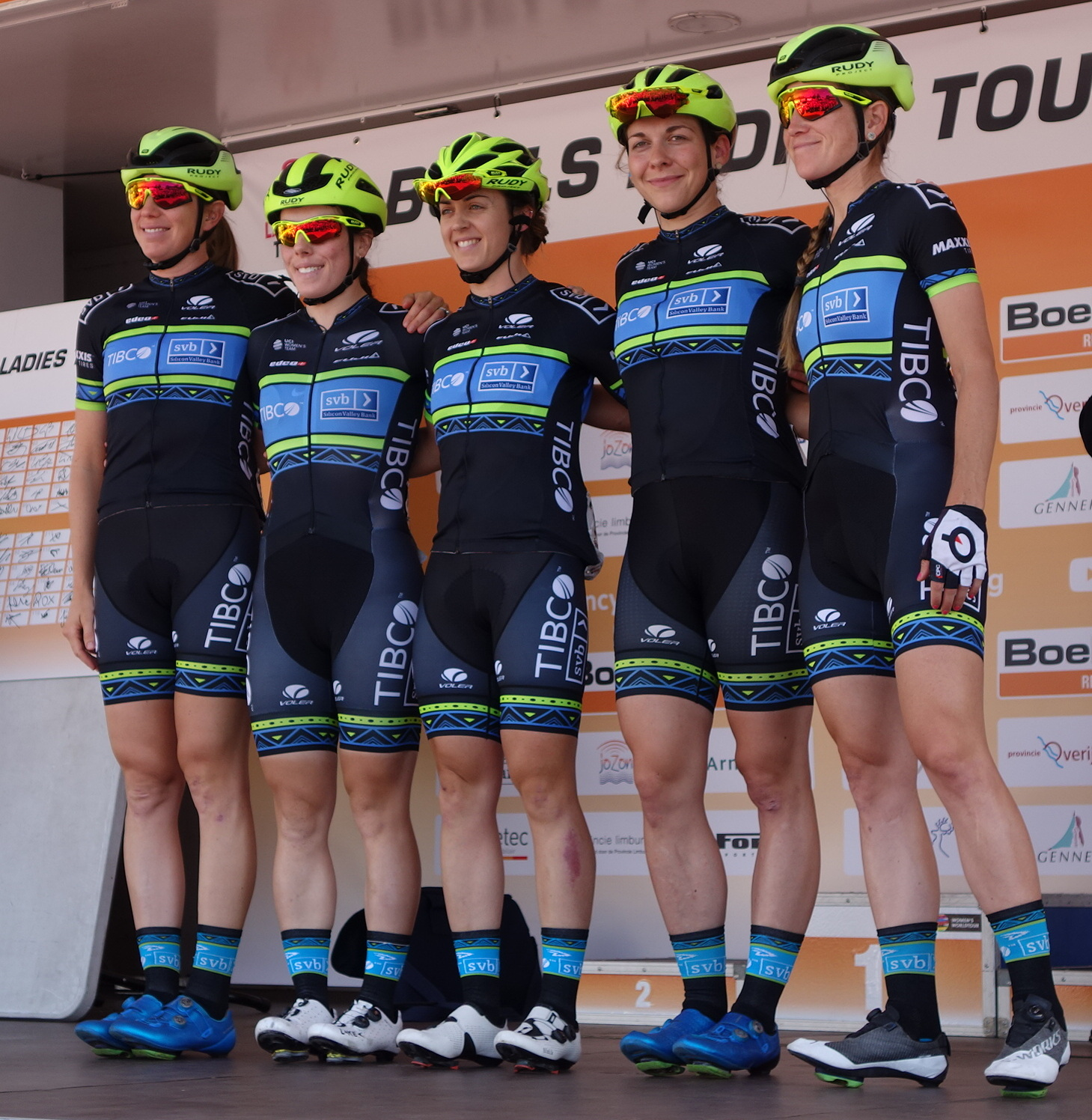 Tibco-SVB bij de start van de eerste etappe van Stramproy naar Weert in de Boels Ladies Tour 2019